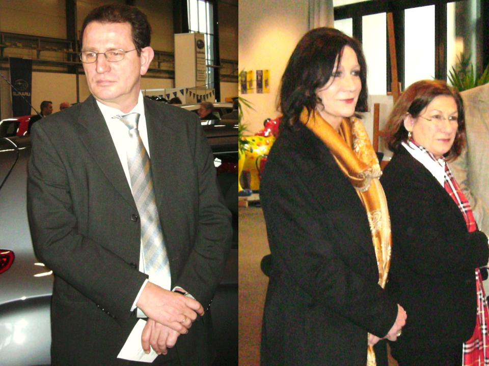 Internationale Saarmesse (Saarbrücken): Veranstalter Geschwister Eric, Eva und Mechthild Grandmontagne (v.l.n.r.)